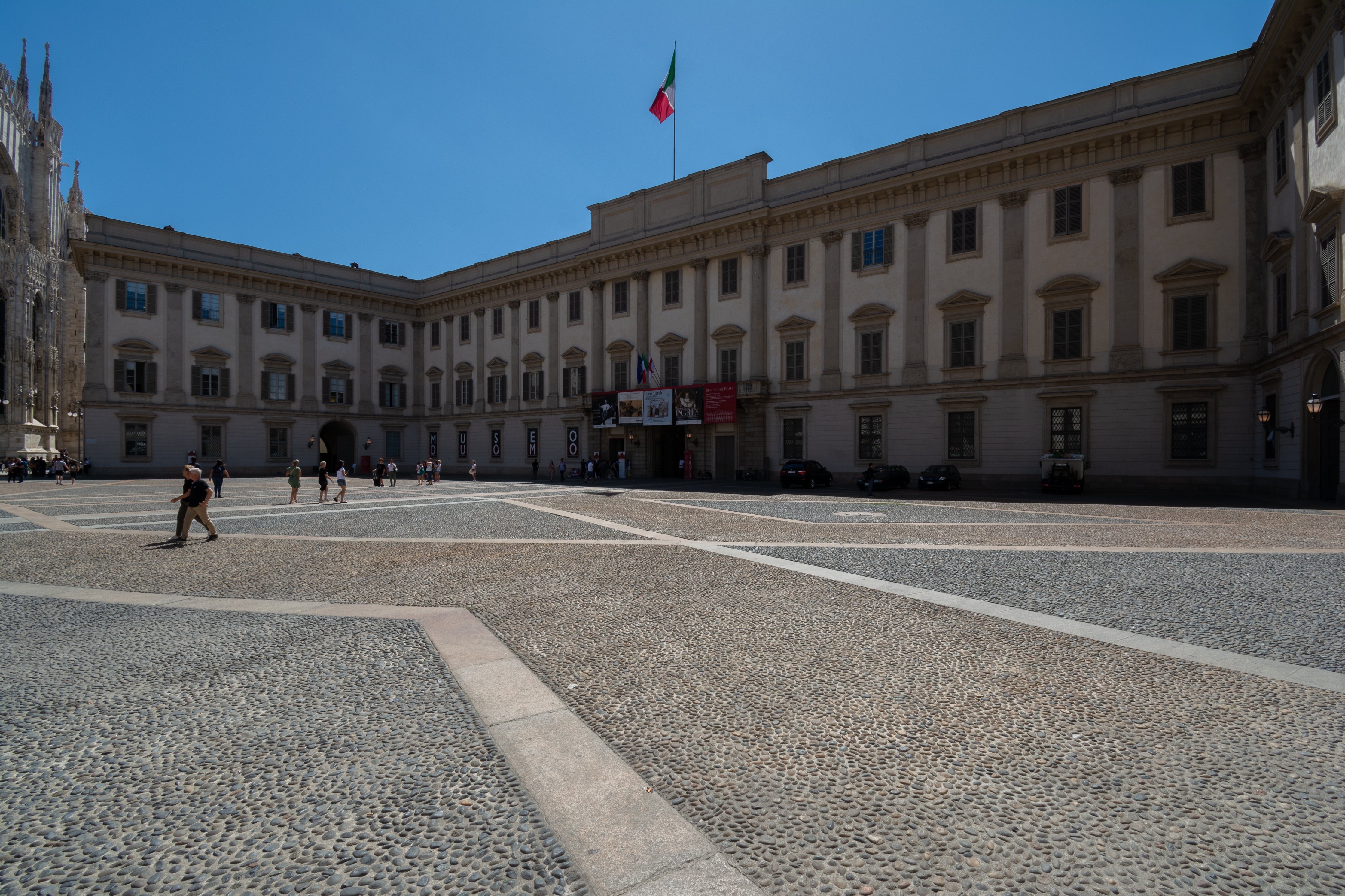 Palazzo Reale di Milano This is a photo of a monument which is part of cultural heritage of Italy.